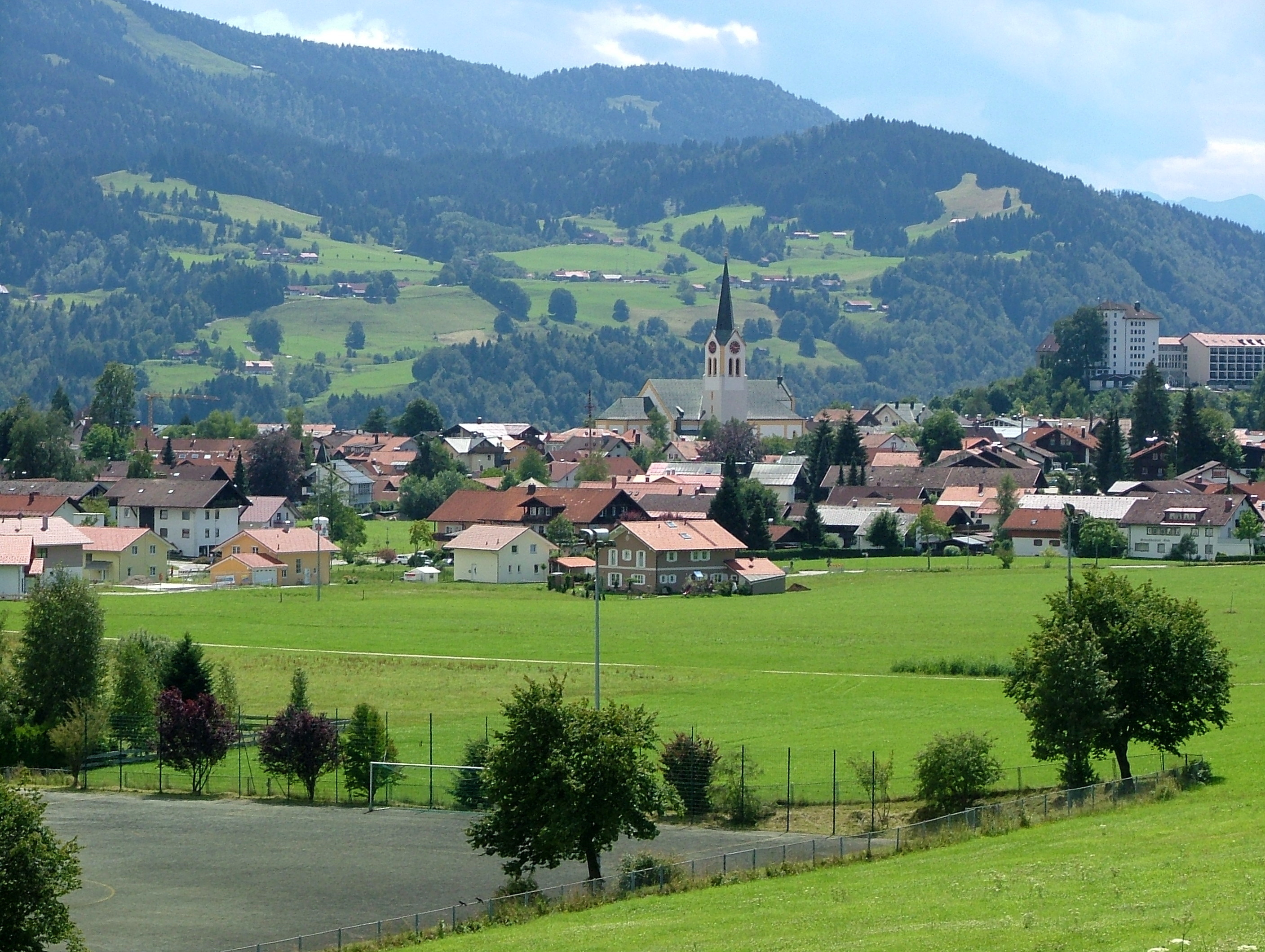 Oberstaufen